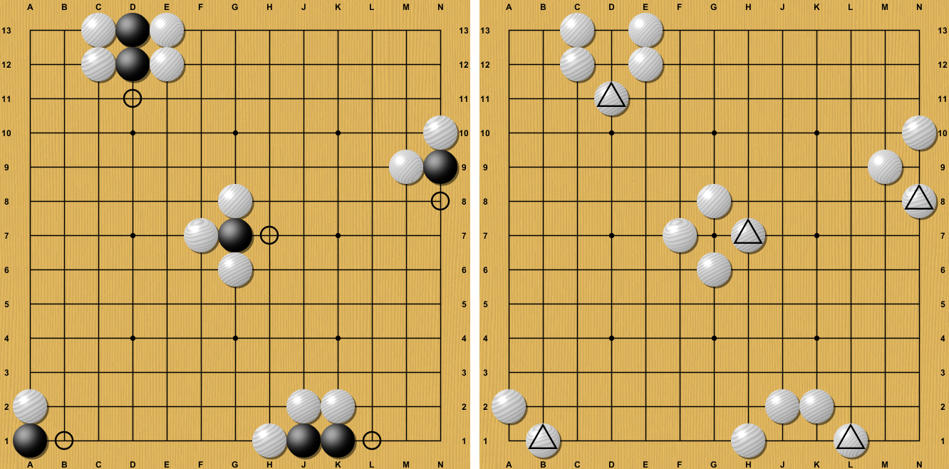 Descripción gráfica de la técnica de captura en el juego de Go